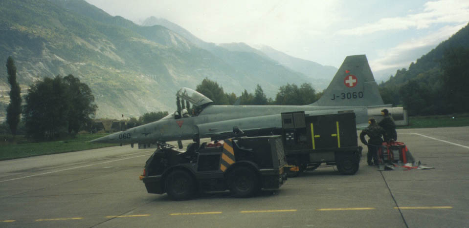 F-5 vorflug, Bucher FS 10 Flugzeugschlepper 78, 10 t, L, 4x2